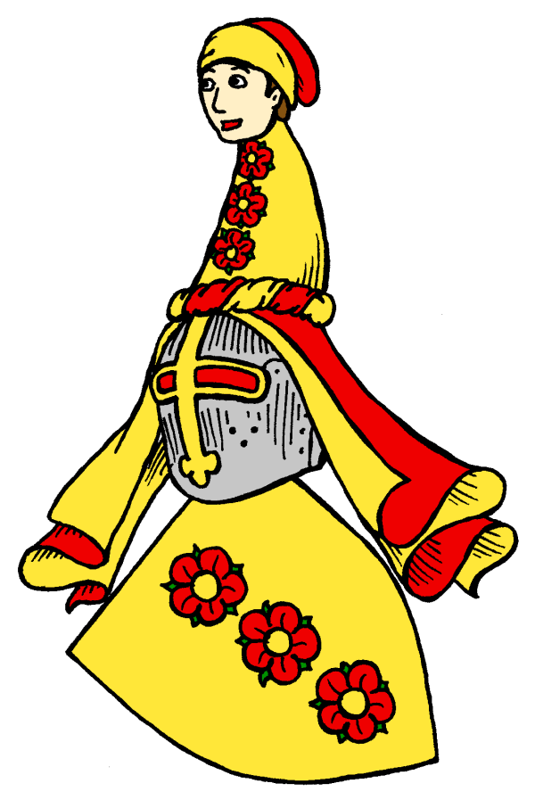 Wappen derer von Buchegg 1